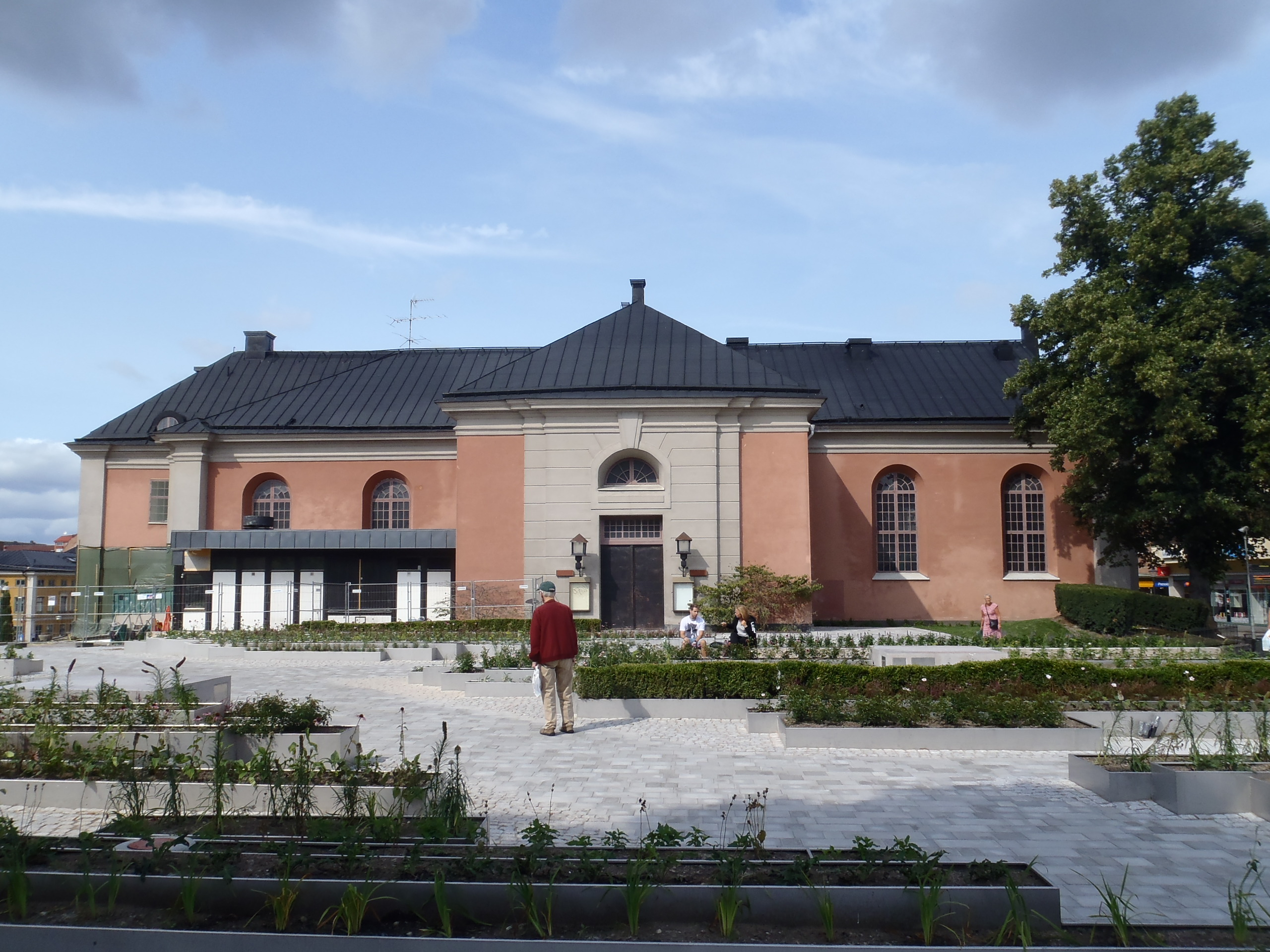 Sankt Johannes gamla kyrka, nuvarande Hörsalen i Norrköping.